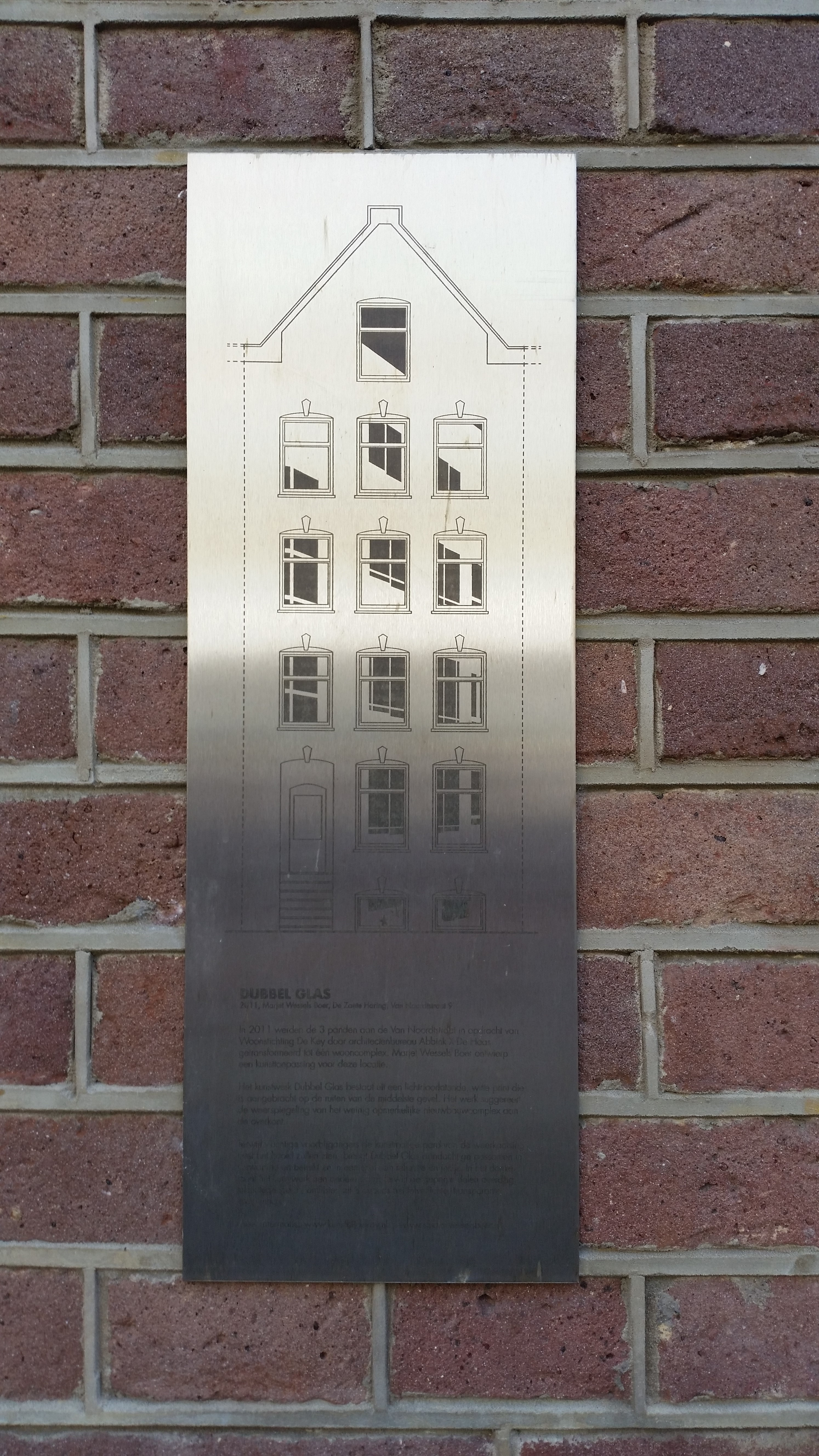 Plaquette van "Dubbel glas" van Marjet Wessels Boer op Van Noordtstraat 9, Amsterdam